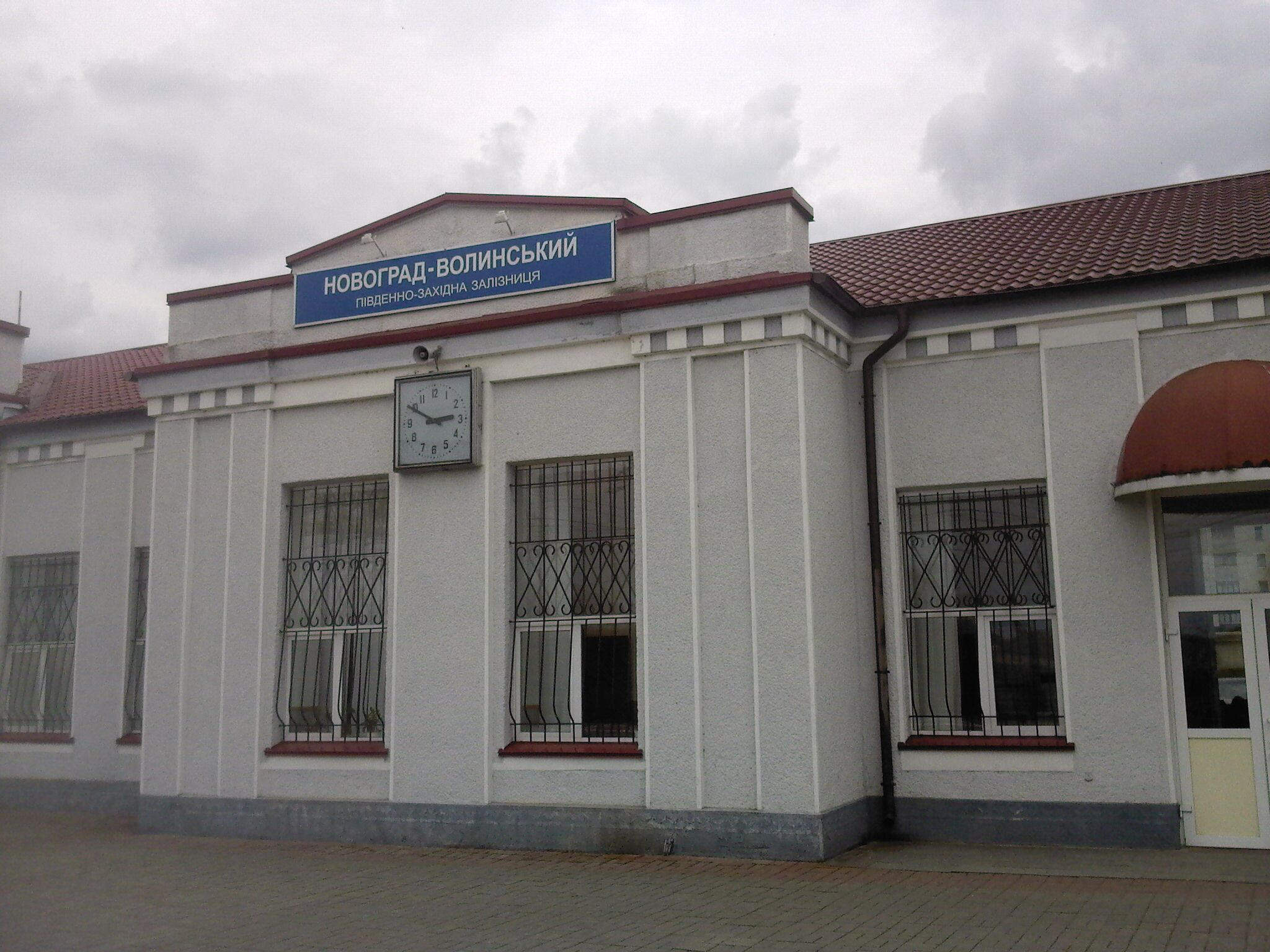 Вокзал у Новограді-Волинському